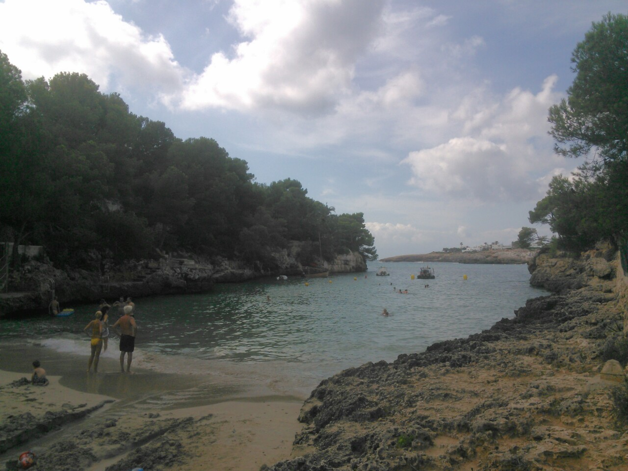 Cala Serena